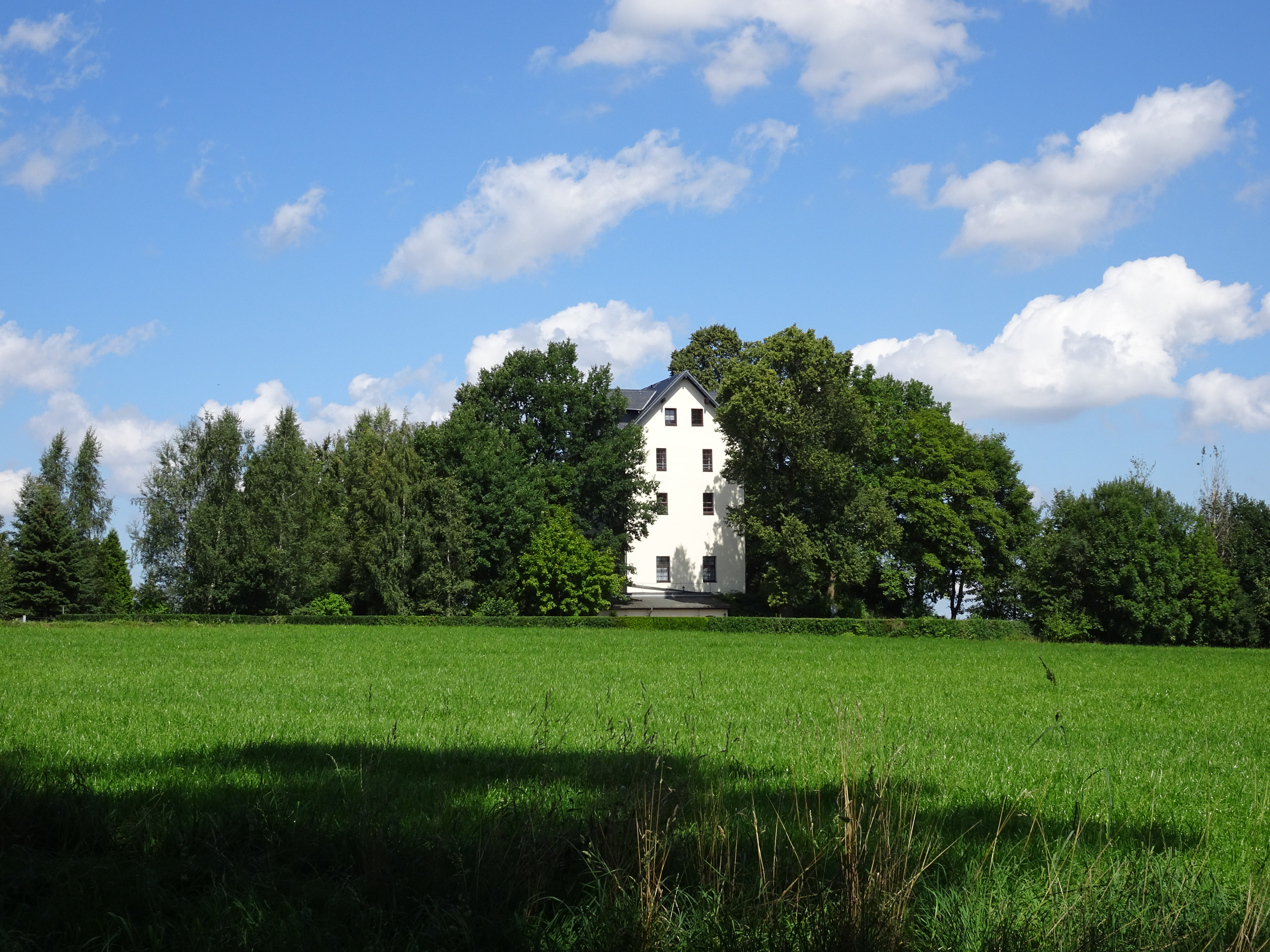 Denkmalgeschütztes Gebäude und Halde des ehemaligen Deffourschachtes in Chemnitz-Mittelbach